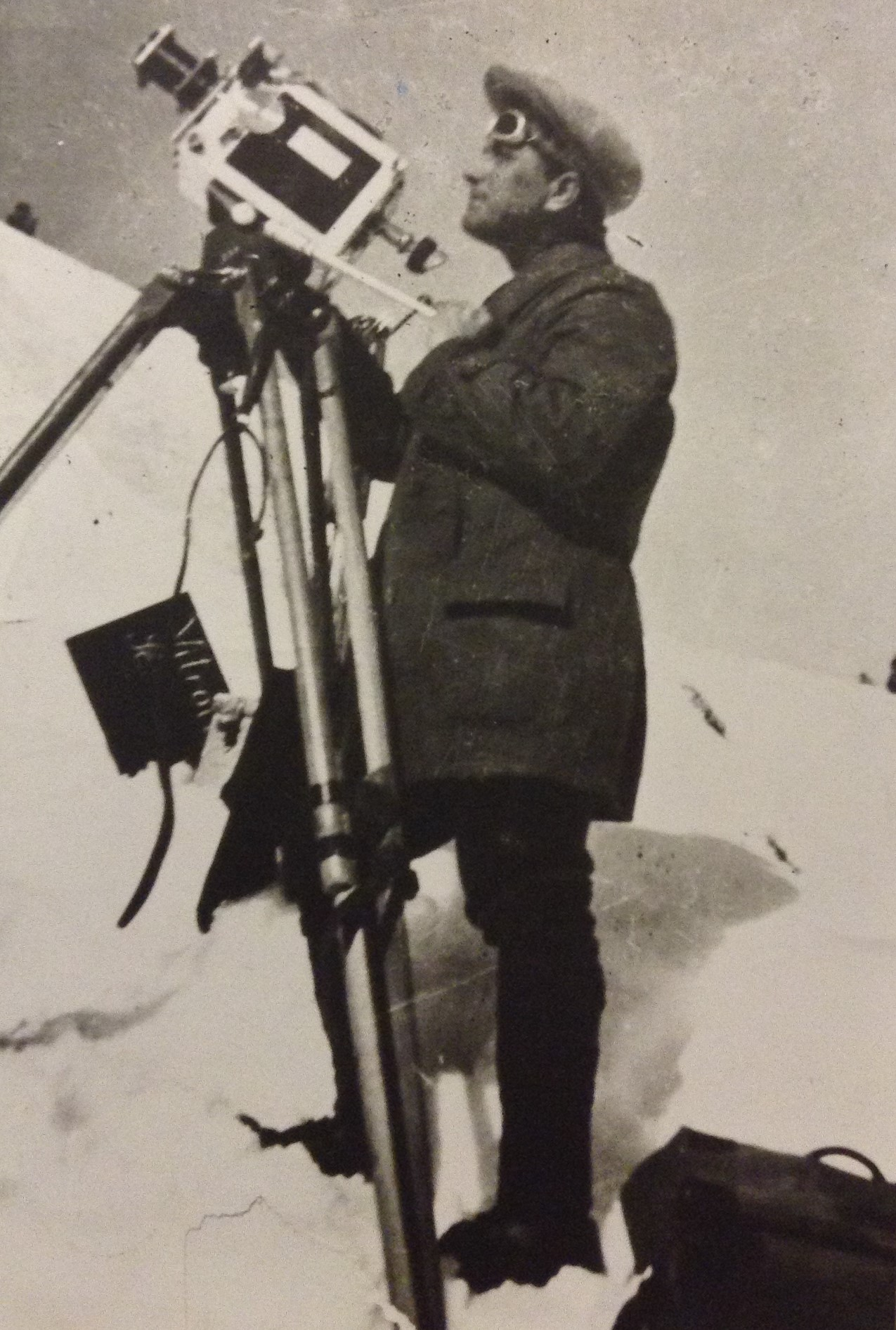 Giovanni Vitrotti nel 1926/1927